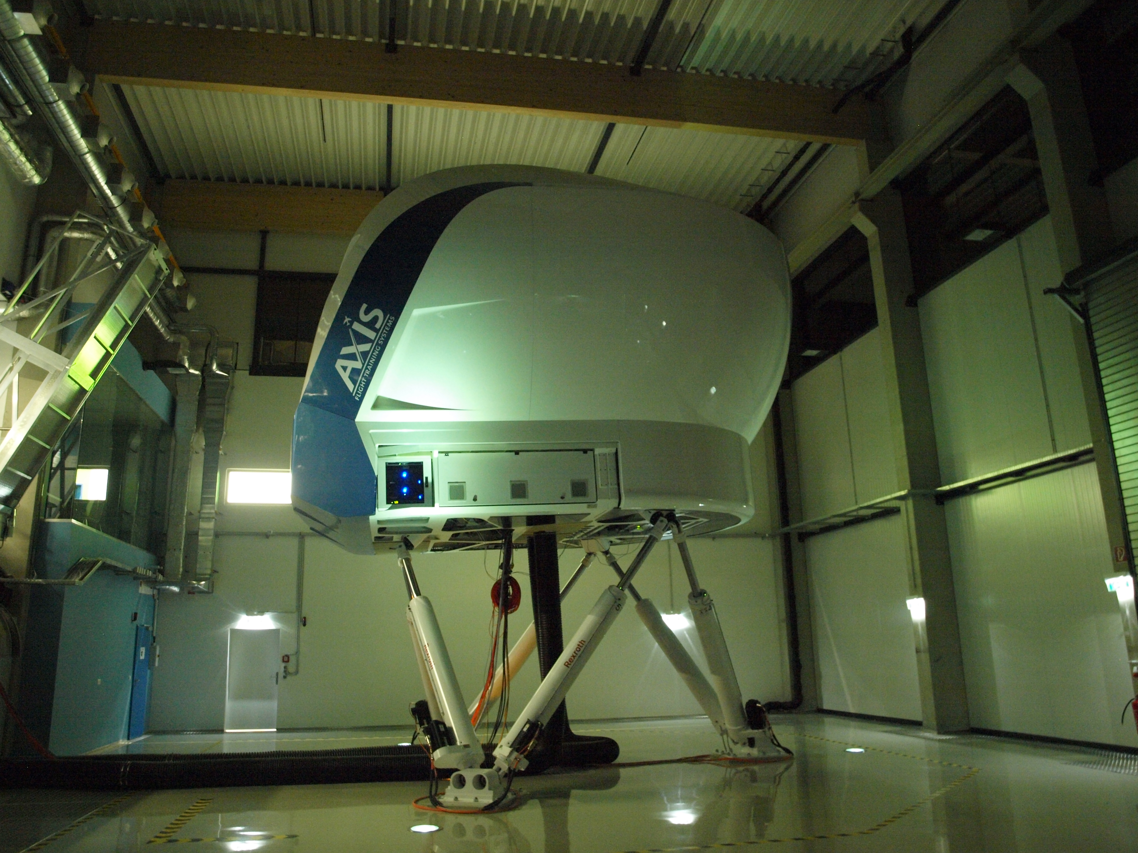 Außenansicht des Farnair ATR 42/72 Simulators